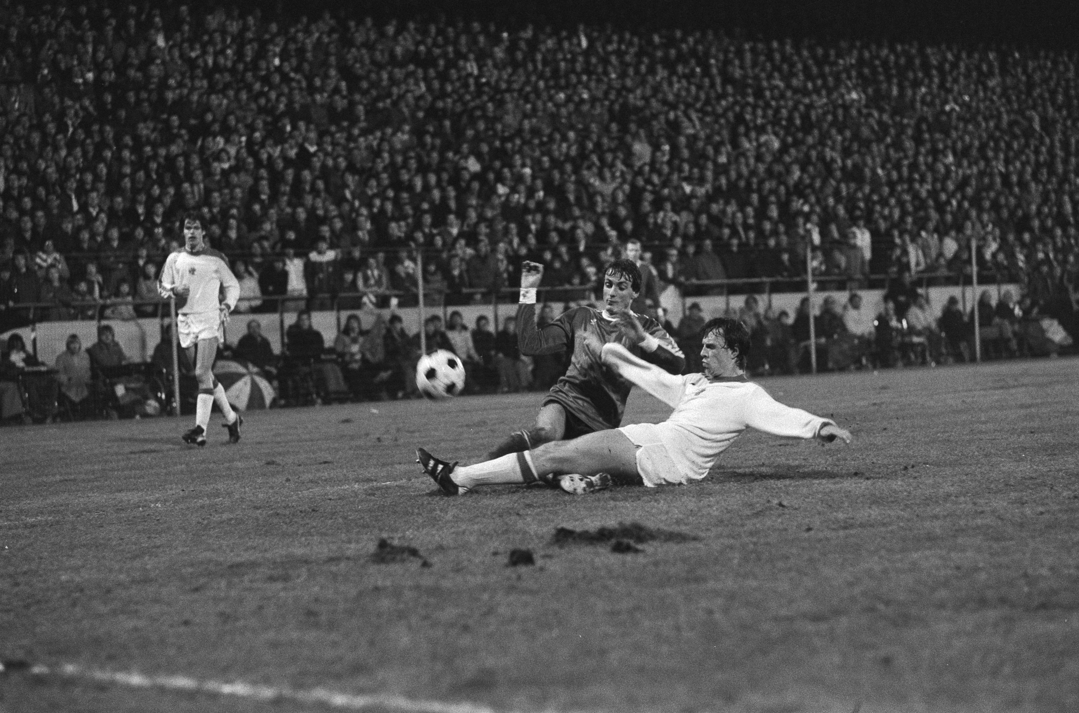 Collectie / Archief : Fotocollectie Anefo Reportage / Serie : PSV tegen Ajax 3-1 Beschrijving : Poortvliet (links) in duel met Everse Datum : 17 maart 1979 Locatie : Eindhoven, Noord-Brabant Trefwoorden : sport, voetbal Persoonsnaam : Everse, Jan, Poortvliet, Jan Fotograaf : Suyk, Koen / Anefo Auteursrechthebbende : Nationaal Archief Materiaalsoort : Negatief (zwart/wit) Nummer archiefinventaris : bekijk toegang 2.24.01.05 Bestanddeelnummer : 930-1735